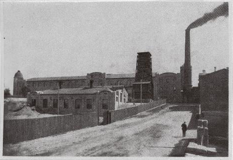 Целлюлозно-бумажная фабрика Эрнст Оссе и Ко